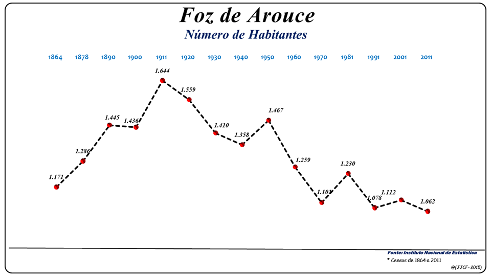 População